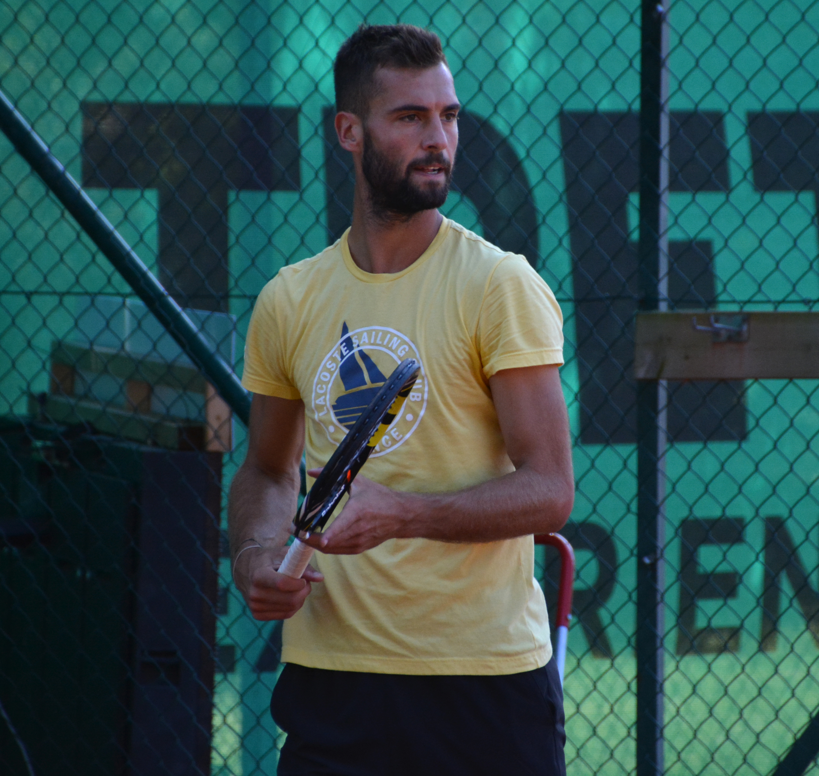 ATP Båstad 2015